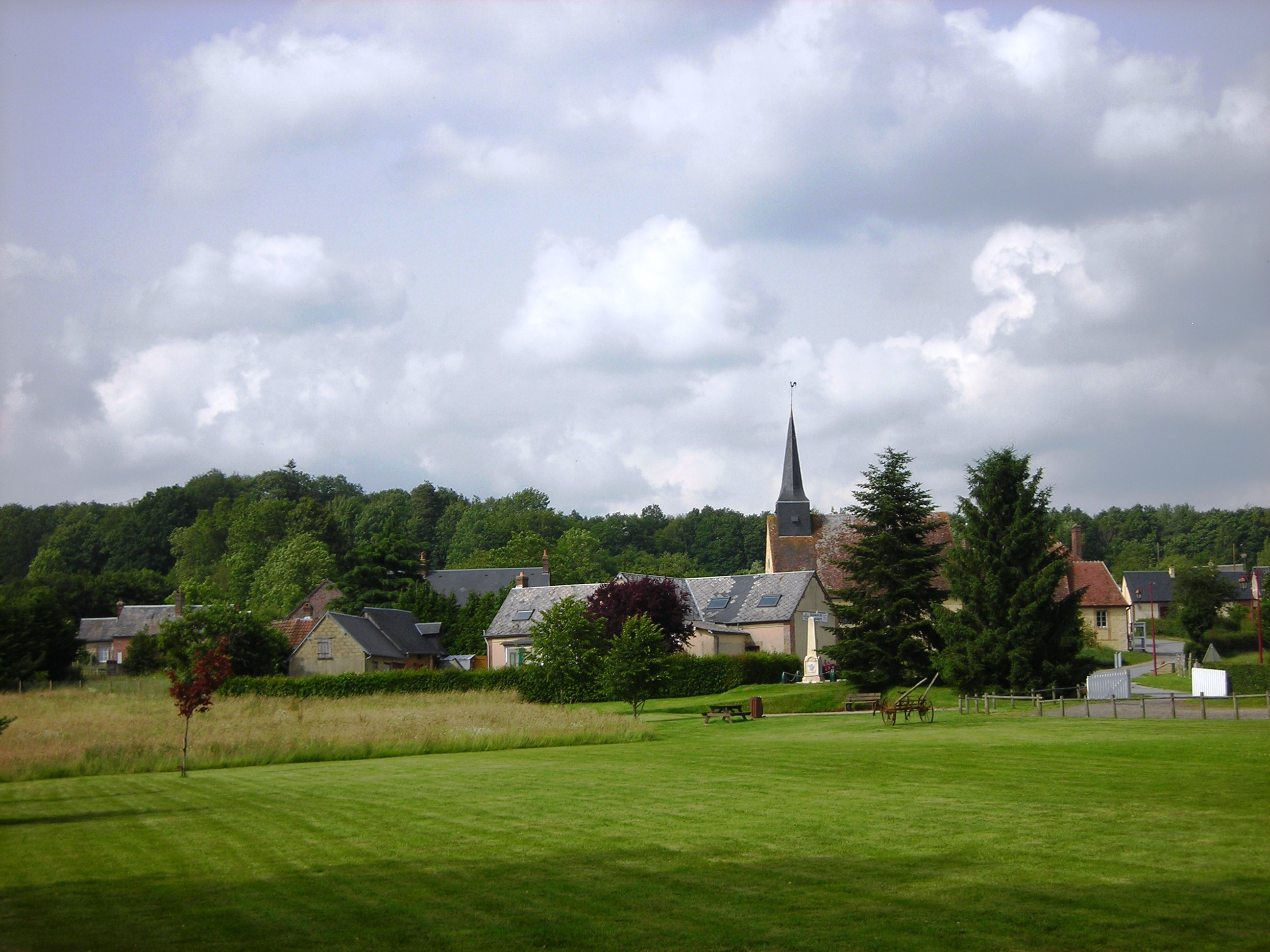 Saint-Pierre-des-Loges (Orne, France).